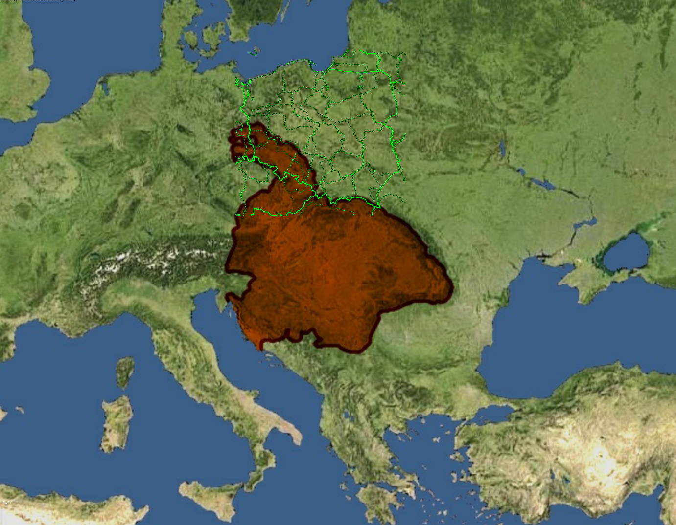 Królestwo Węgier pod panowaniem Macieja Korwina. Dla przedstawienia zasięgu państwa na północ dodano na mapie obrys Polski 2018